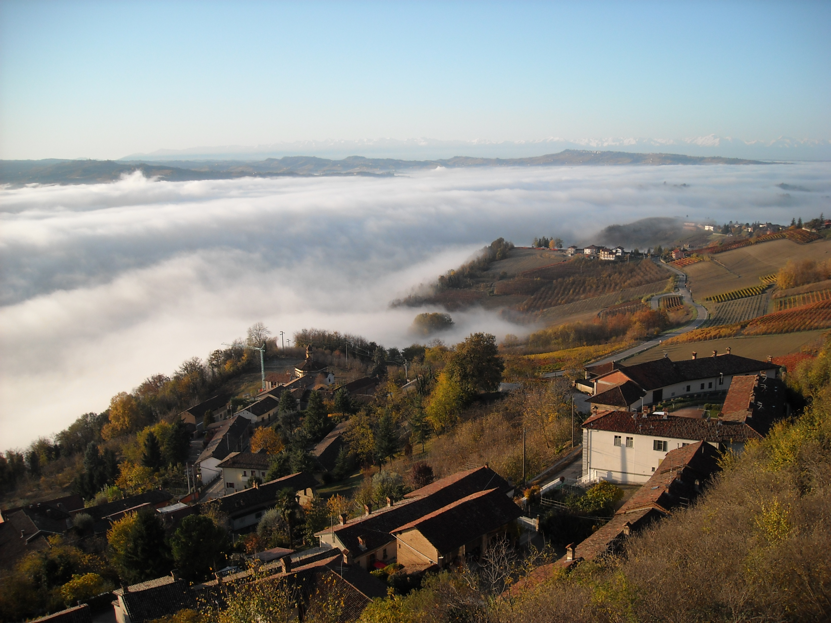 La città di Alba, CN, sotto la nebbia, ripresa dal "poggiolo" panoramico di Guarene